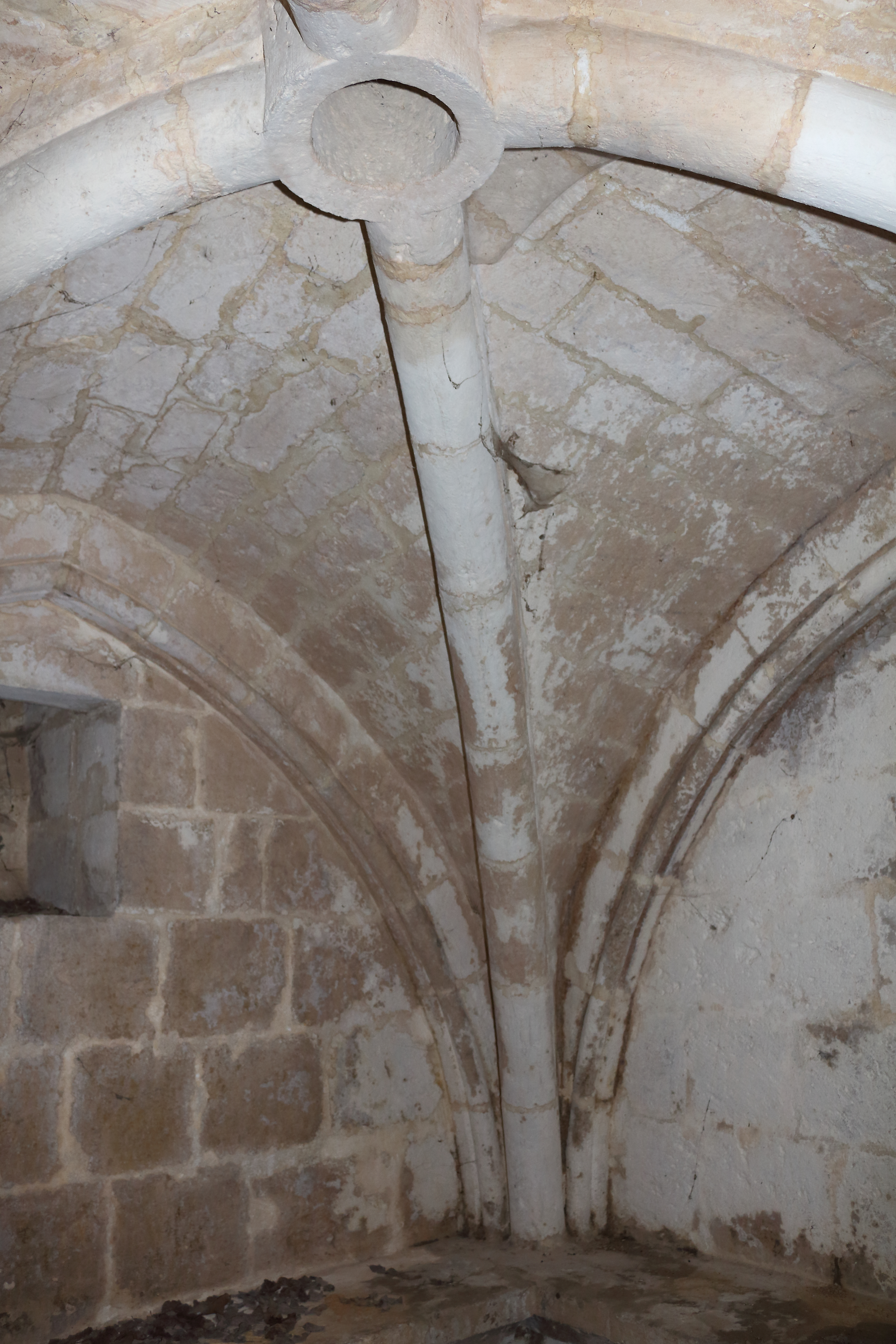 La voûte croisée d'ogives de la crypte de l'église Notre-Dame de Thézac, Charente-Maritime, Poitou-Charentes, France. .